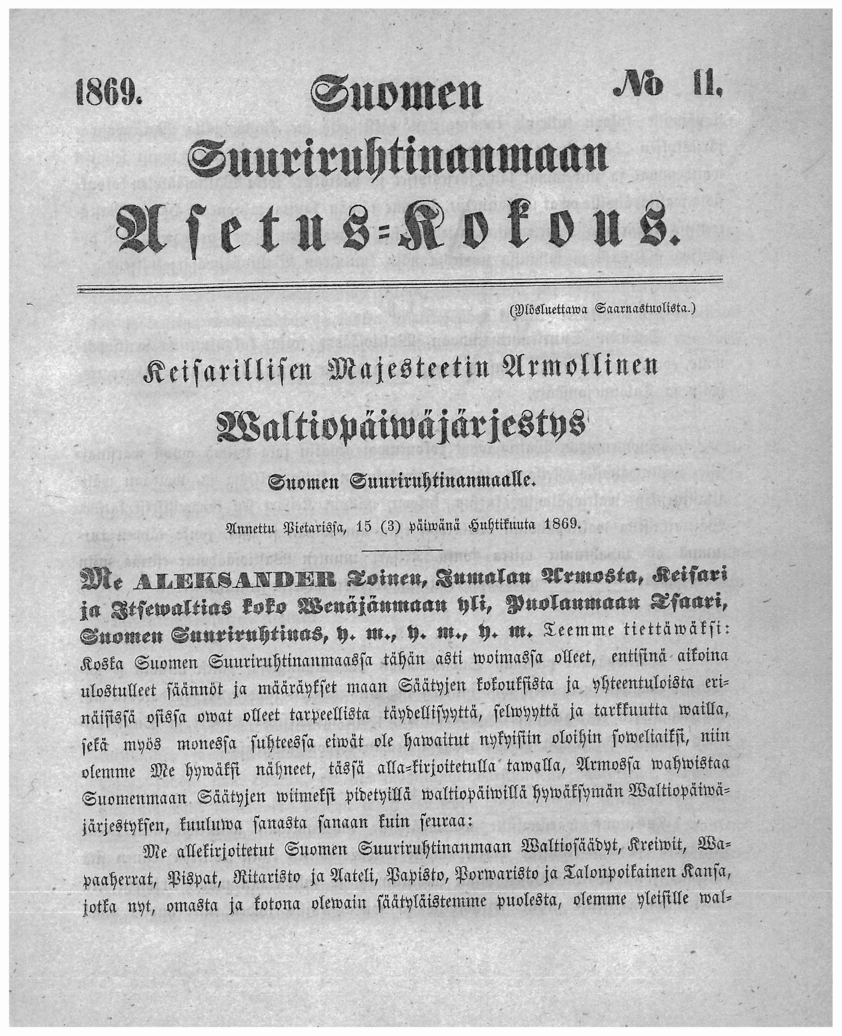 Keisarillisen Majesteetin Armollinen Valtiopäiväjärjestys, ensimmäinen sivu (AsK 11/1869).